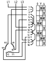 Aansluitschema_410